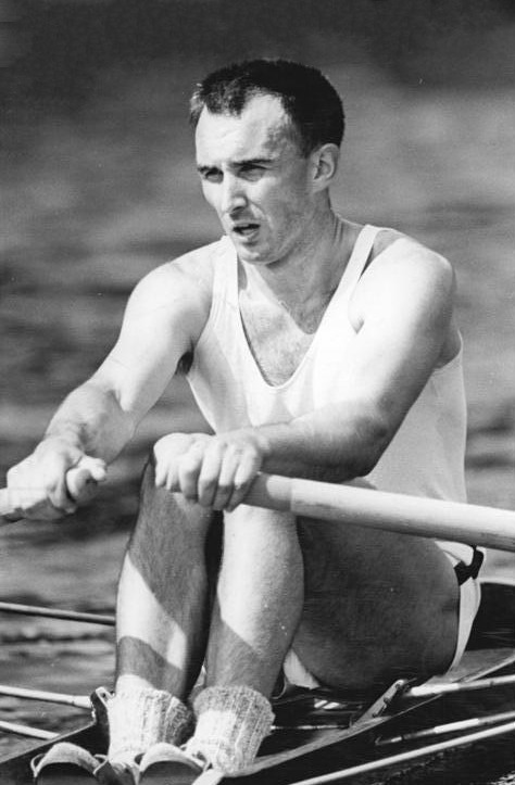 Achim Hill Zentralbild Kohls 12.8.62 Deutsche Rudermeisterschaften 1962 am 11. und 12.8.62 auf dem Templiner See bei Potsdam. UBz: Achim Hill (BSG Wissenschaft TU Dresden) wurde überlegen Deutscher Meister im Einer.